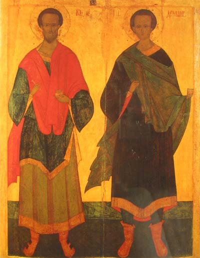 Икона: Святые-бессребреники Косма и Дамиан 108.5 x 80 см